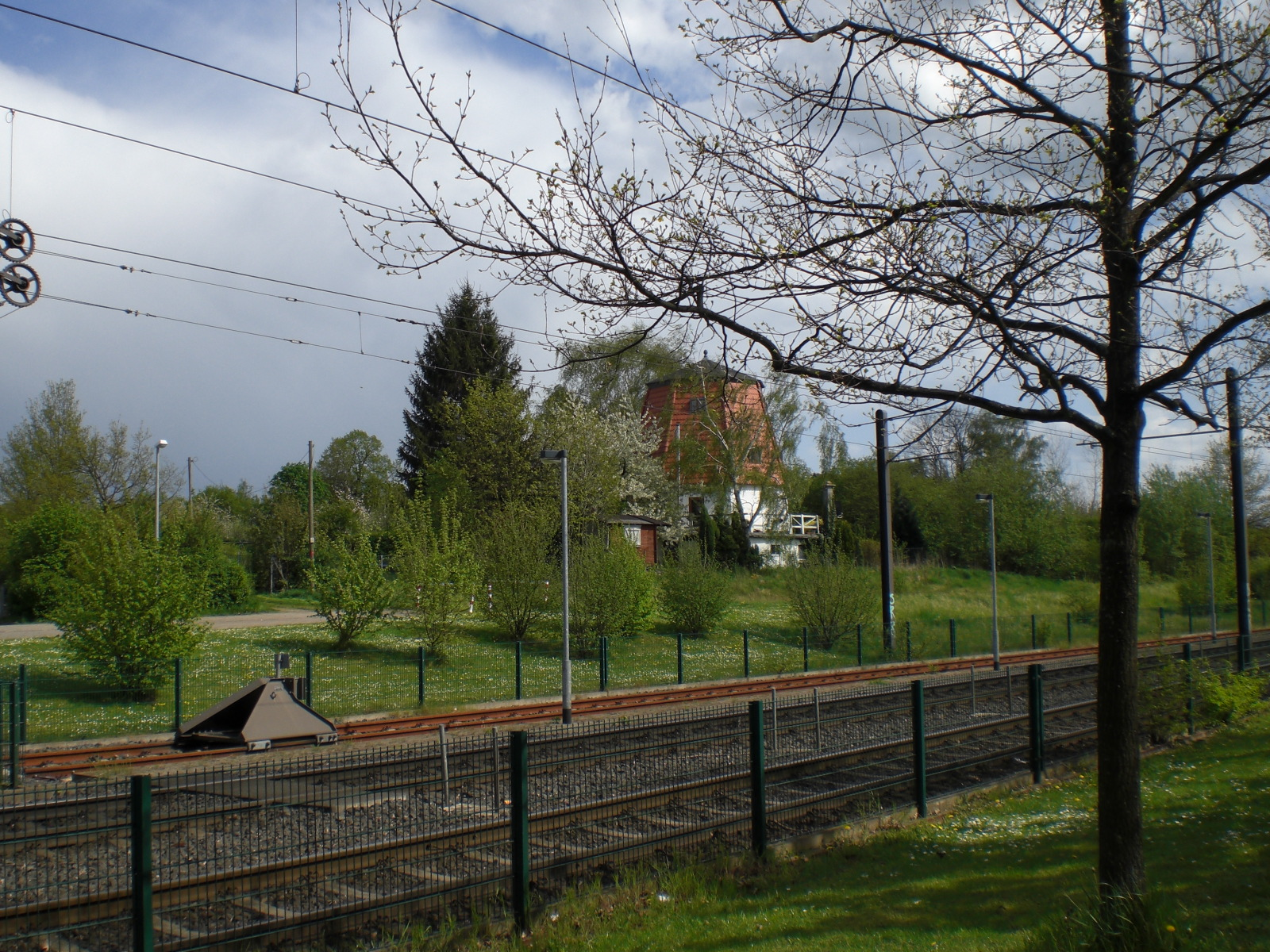 Hannover: Mühlenberg mit Restmühle